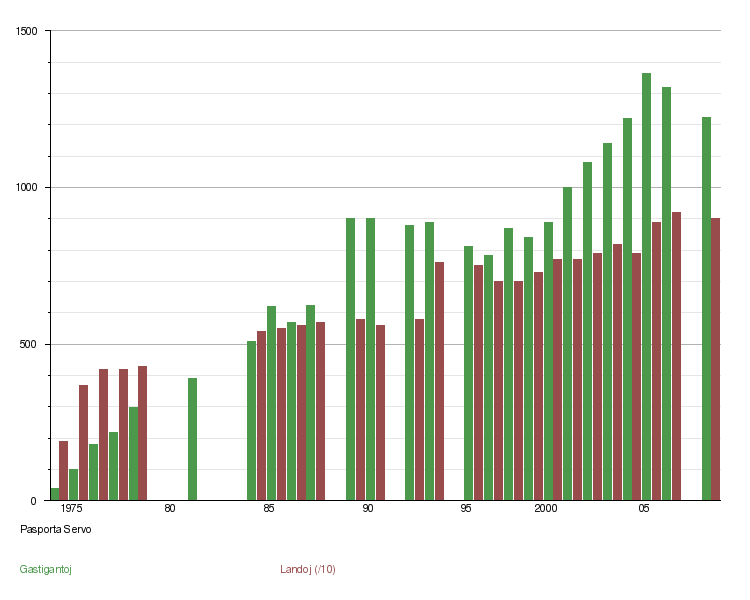 Grafiko prezentanta la gastigantaron de Pasporta Servo de 1974 ĝis 2008. (La dosiero estas kreita en la ŝablono Template:Ŝ per EasyTimeline kaj aperas en la paĝo :eo:Pasporta Servo#PS laŭ jaroj| .) Kategorio:Statistiko de Esperantujo Kategorio:Bildoj pri la Esperanto-Movado